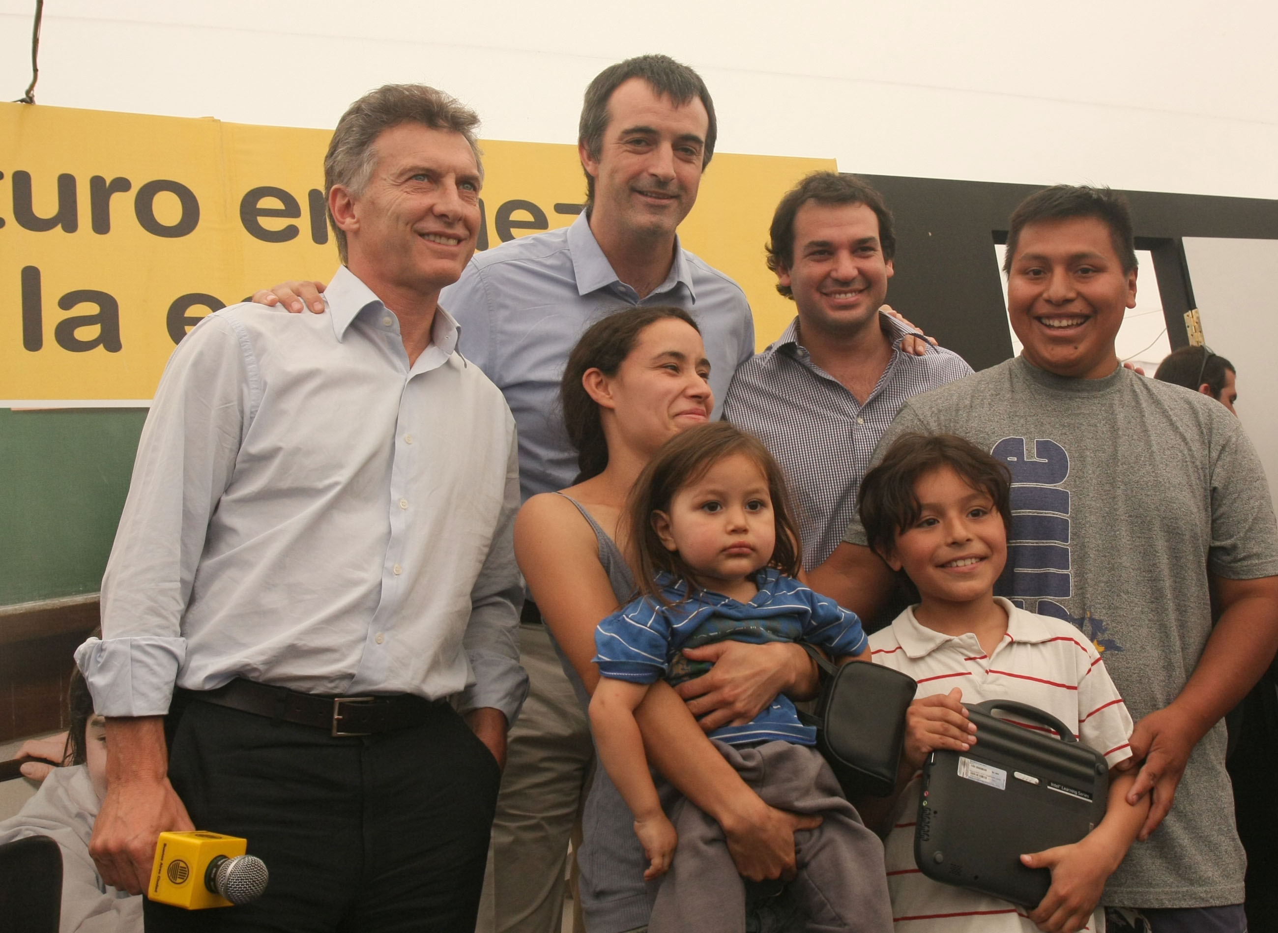 Buenos Aires. Diciembre 27 de 2011. El jefe de Gobierno porteño, Mauricio Macri, visitó hoy junto al ministro de Educación, Esteban Bullrich, el centro de distribución de computadoras ubicado en Parque Roca, donde se entregan máquinas netbooks a los alumnos de los colegios públicos primarios de la ciudad. Foto Matias Repetto Bonpland-gv/GCBA.- Area Fotografía Secretaria de Medios G.C.B.A. Av. de Mayo 575-3p#306 4323-9661